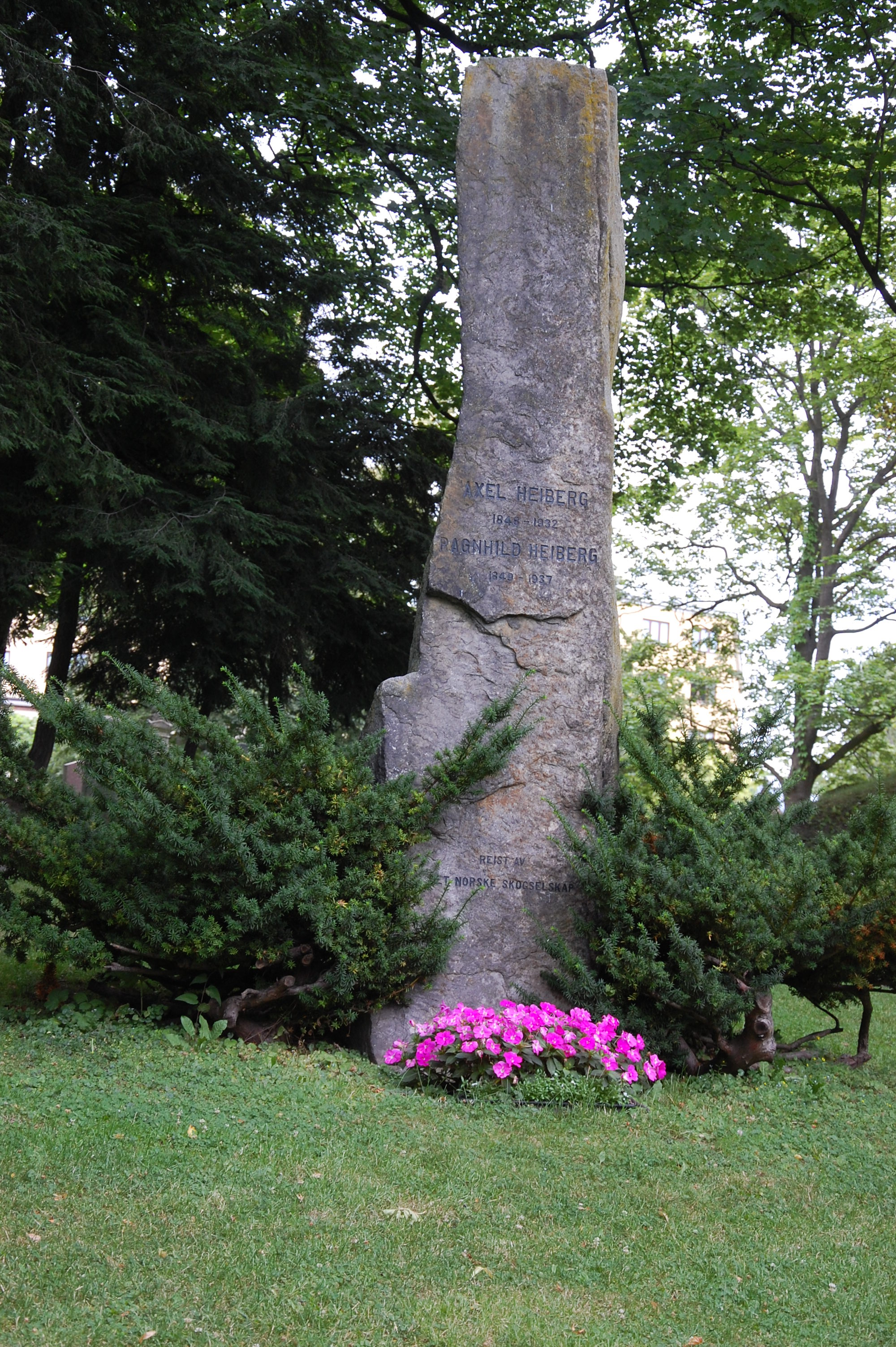 Gravminne for Axel Heiberg 1848–1932 og ektefellen Ragnhild Heiberg f. Meyer 1849–1937, Vår Frelsers gravlund i Oslo, Æreslunden, reist av Det norske skogselskap.